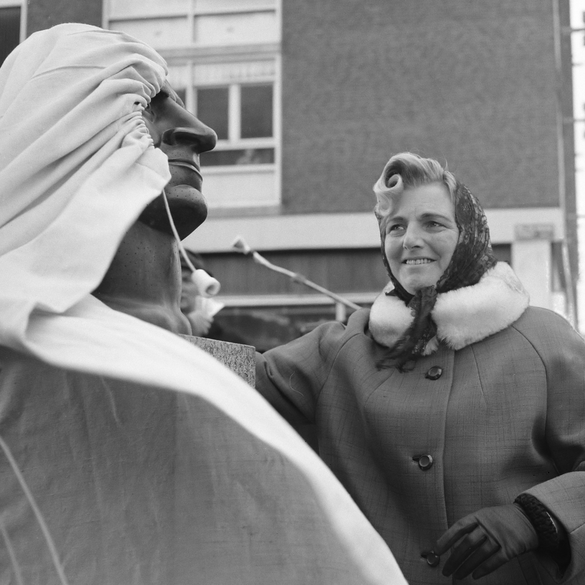 De weduwe van verzetsstrijder Willem Kraan onthulde in Amsterdam-Slotermeer een buste genaamd 'De Antifascist' ter nagedachtenis aan haar echtgenoot 26 februari 1966